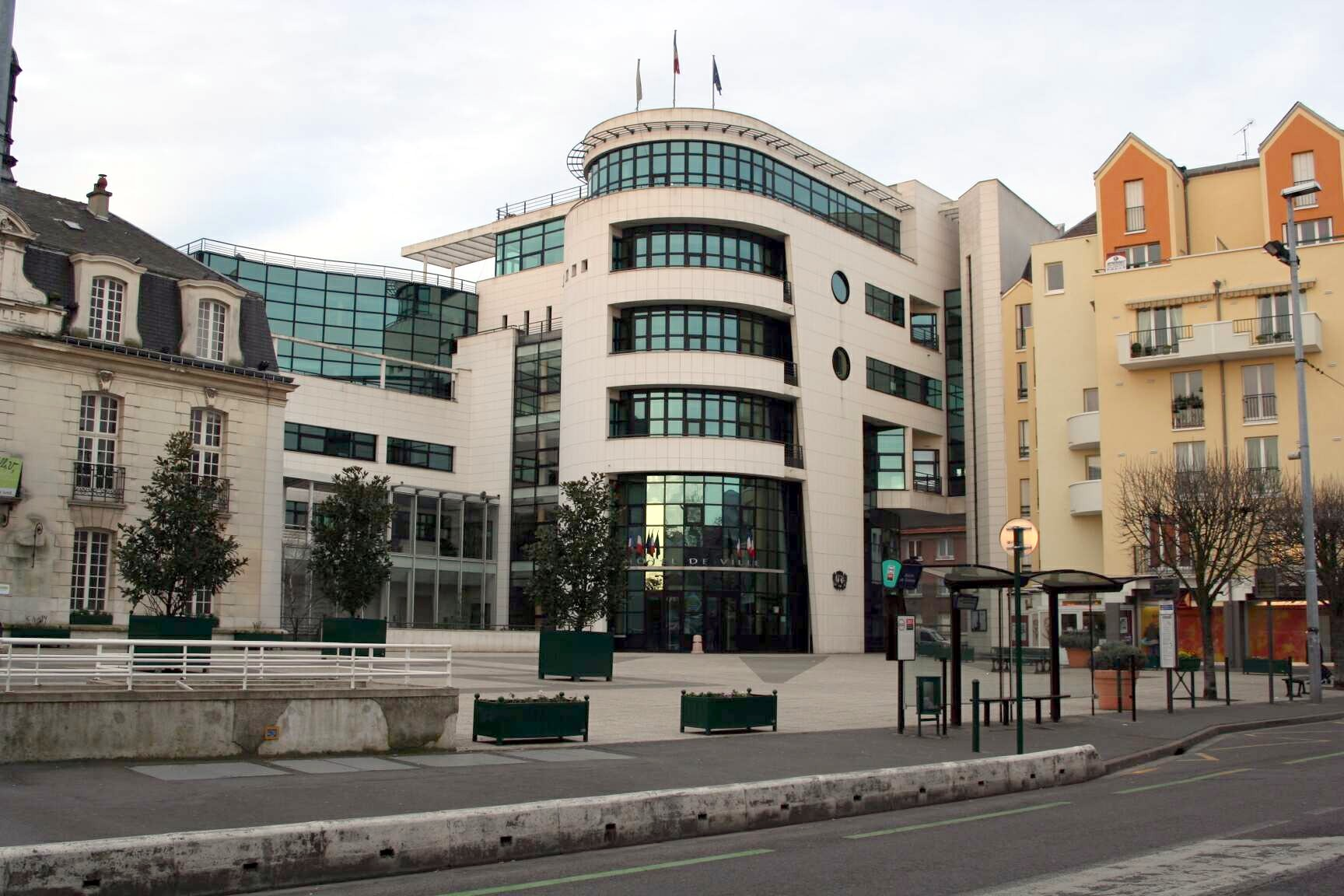 Hôtel de ville de Sannois - Val-d'Oise (France)